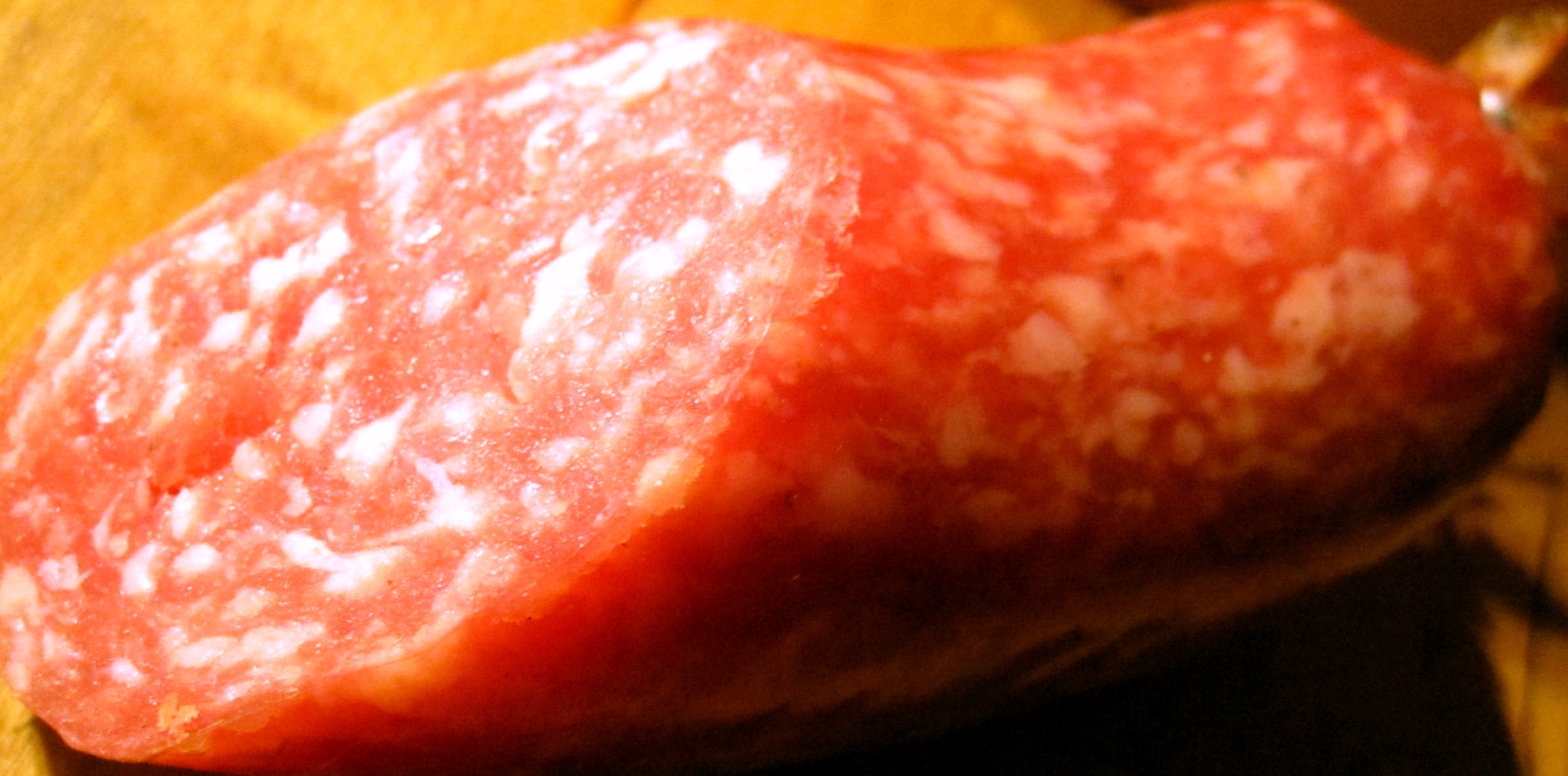 Für die Stadt und die Region Braunschweig typische Braunschweiger, eine Mettwurst